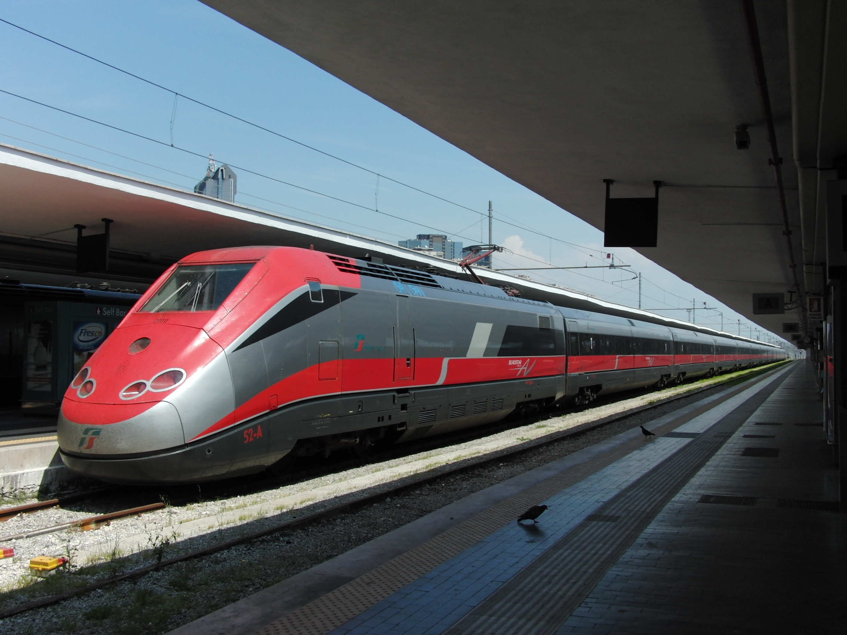 ETR 500